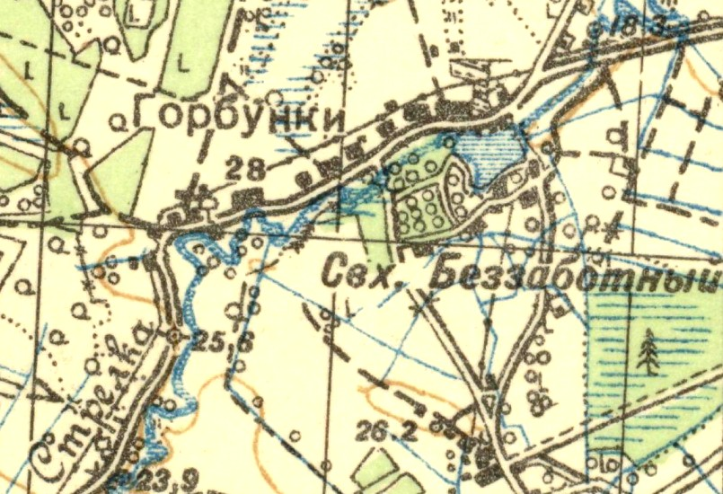 Топографическая карта Ленинградской области, квадрат О-35-12-Г (Ропша), деревня Горбунки